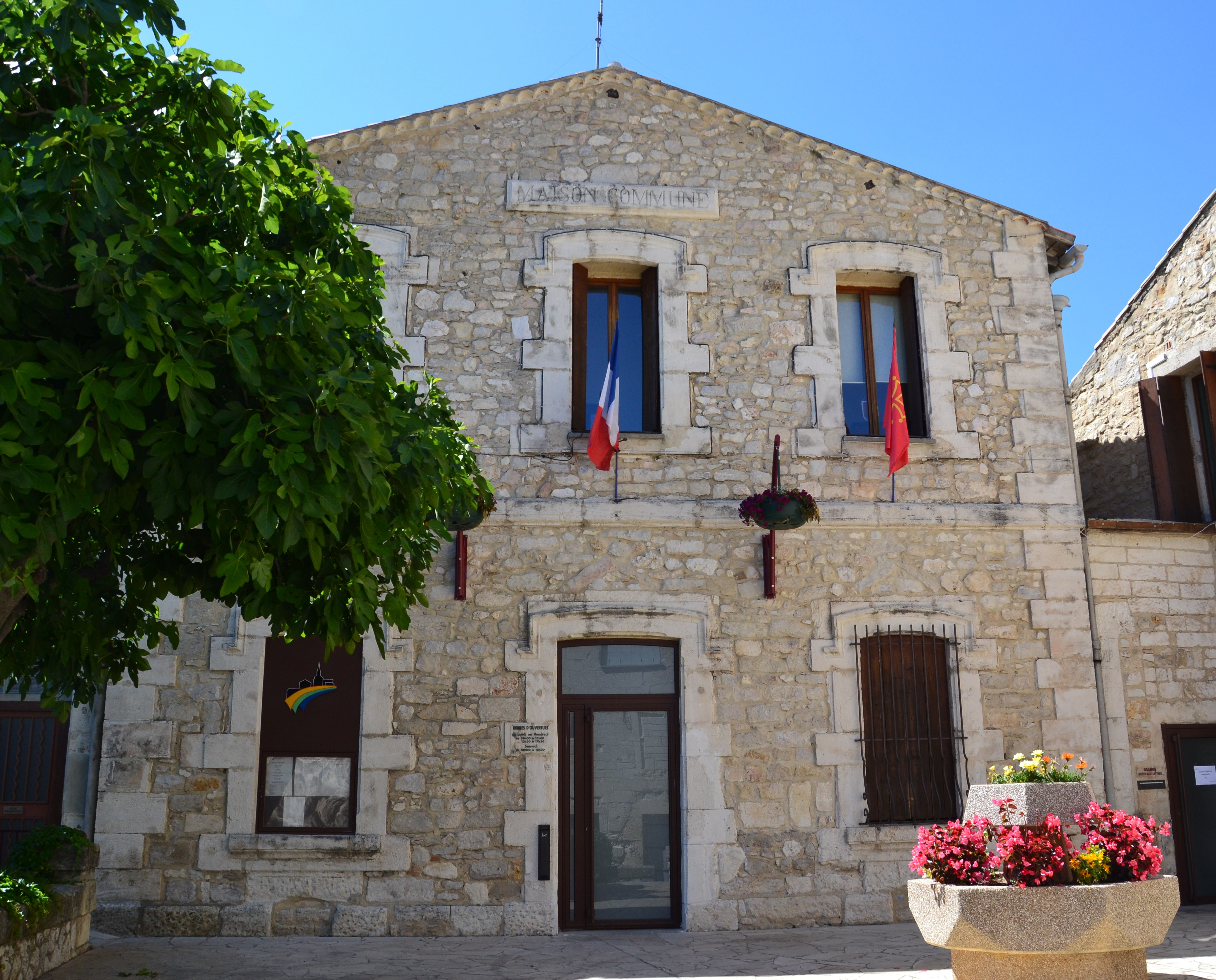 La mairie de Teyran (Hérault).